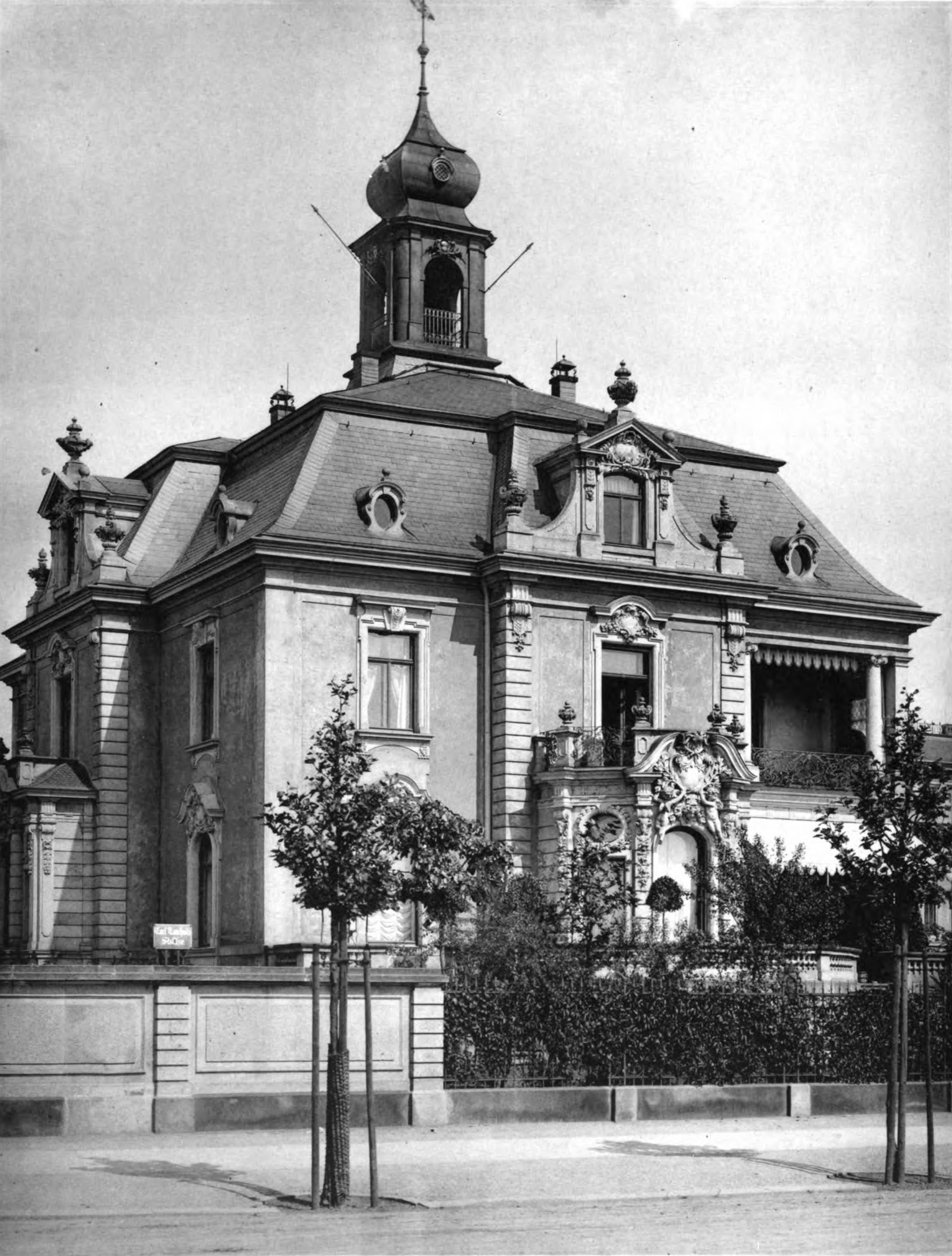 Die Villa für den Rauchwarenfabrikanten und Pelzhändler Paul Albert Thorer stand in der Beethovenstraße 35 an der Ecke Karl-Tauchnitz-Straße (dort wo heute der überdimensionierte villenähnliche Neubau steht) Beschreibung und Abbildung in Blätter für Architektur und Kunsthandwerk Bd. 11 (1898), S. 18 und Tafel 24. Anmerkung: die Hausnummer 15 stimmt definitiv nicht, Hausnummer 15 war die Villa Wölker.